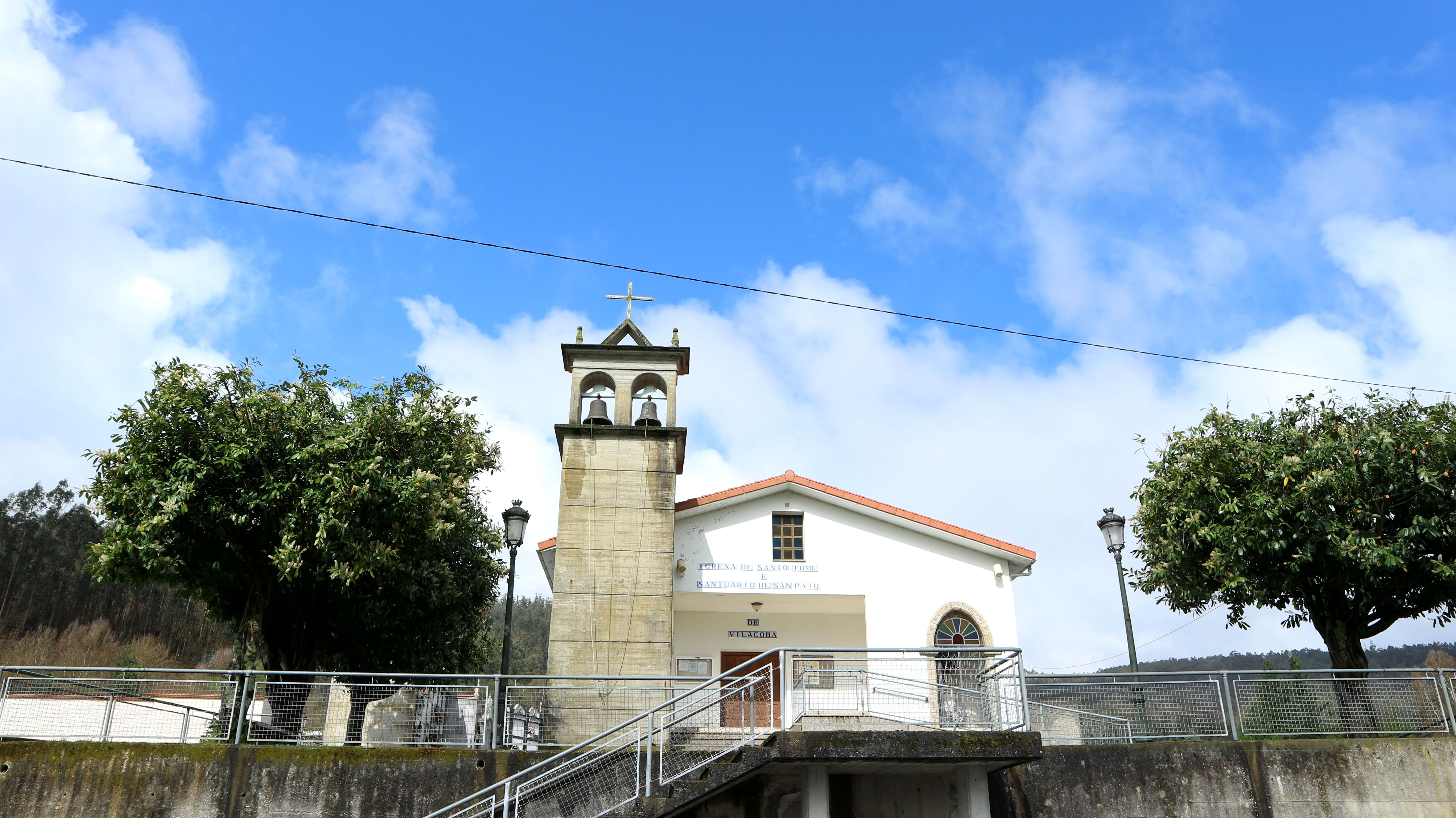 Igrexa de San Tomé e Santuario de San Paio Vilacova, en Vilacoba, Abegondo.